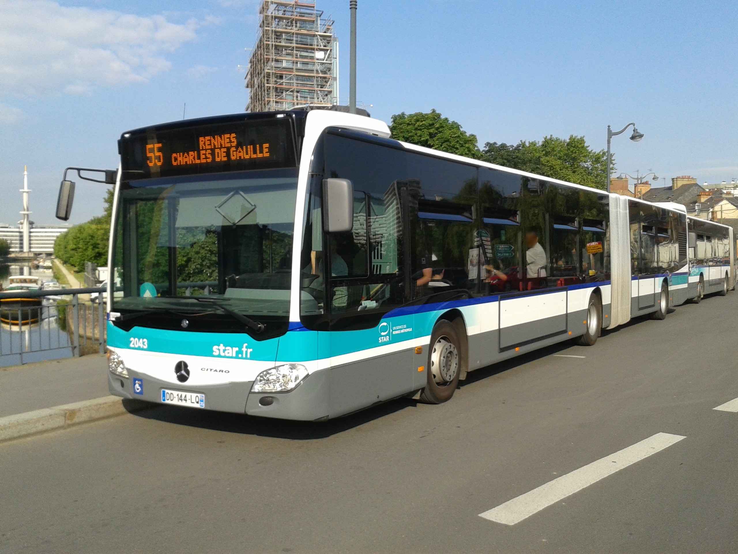 Citaro G C2 n°2043 - Pont de Bretagne à Rennes (35).